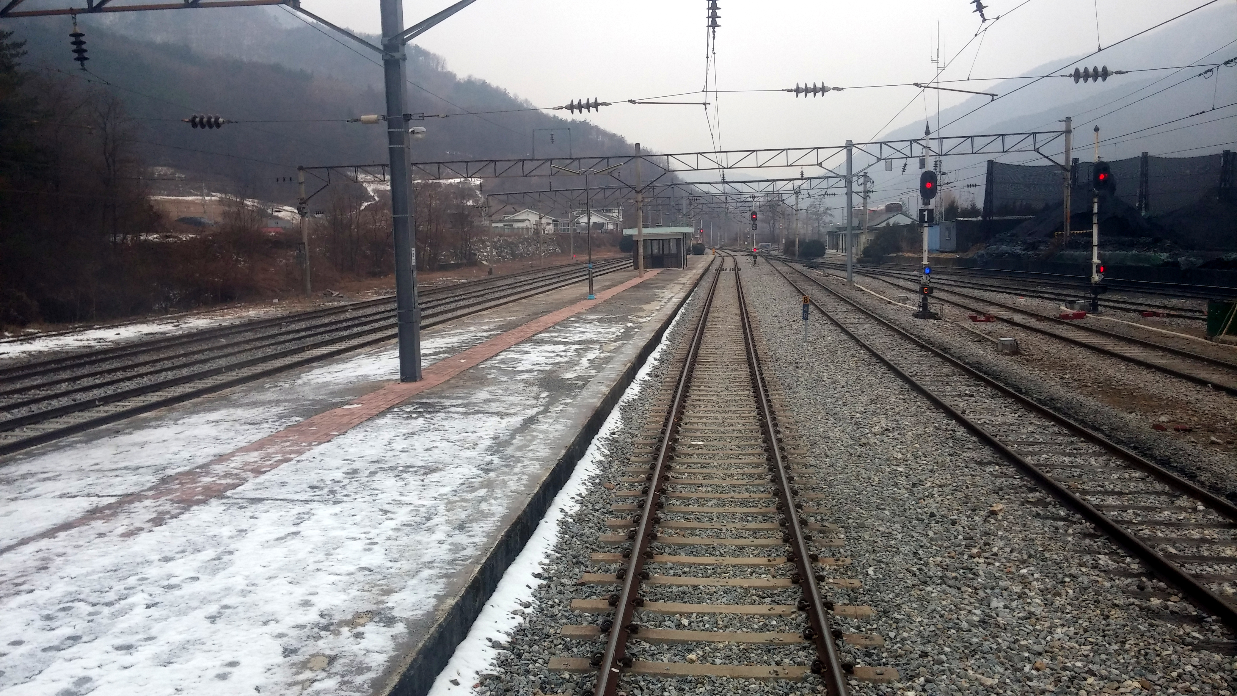 한국철도공사 석항역 승강장.